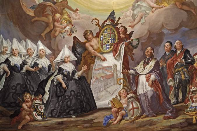 Andreas Brugger: Deckengemälde im Hauptschiff (Krönung Mariens, Gründung des Stifts, Vollendung der Stiftskirche); Detail aus dem Bereich „Vollendung der Stiftskirche“; 1775/1776 (die letzte Fürstäbtissin Maximiliane von Stadion (1737–1816) mit Stiftsdamen, Wappen und Ansicht der Stiftsanlage)